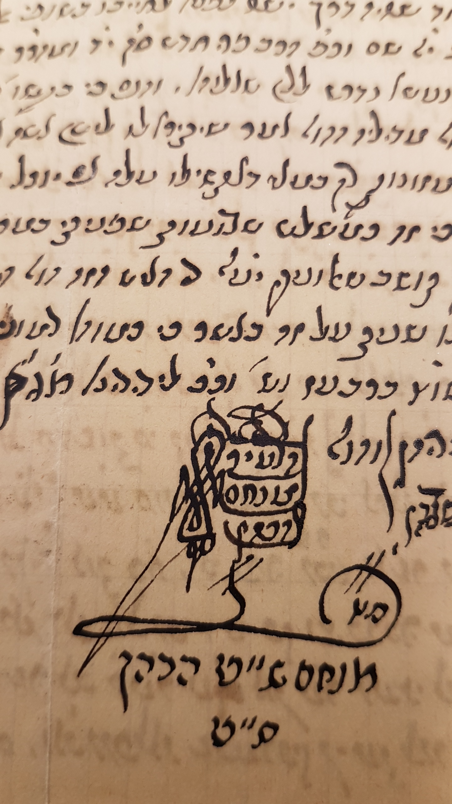 חתימתו וקטע קצר בכתב ידו